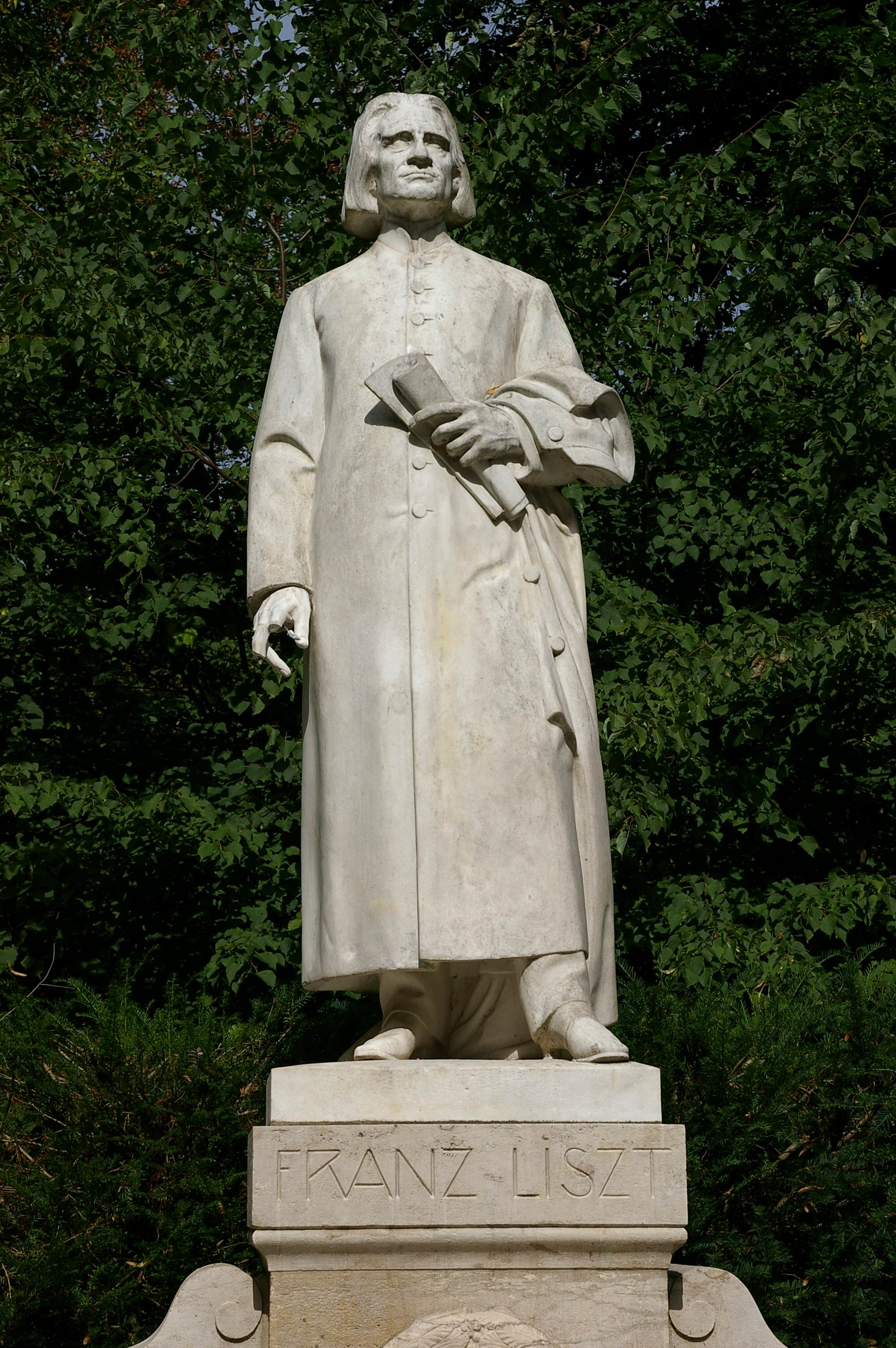 Liszt-Denkmal am Liszt-Haus in Weimar